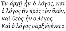 Beschrijving: Joh. 1:1 en Joh 1:14 in het Grieks Zelfgemaakt. (Het gebruikte lettertype is Gentium.) Zelfgemaakt.